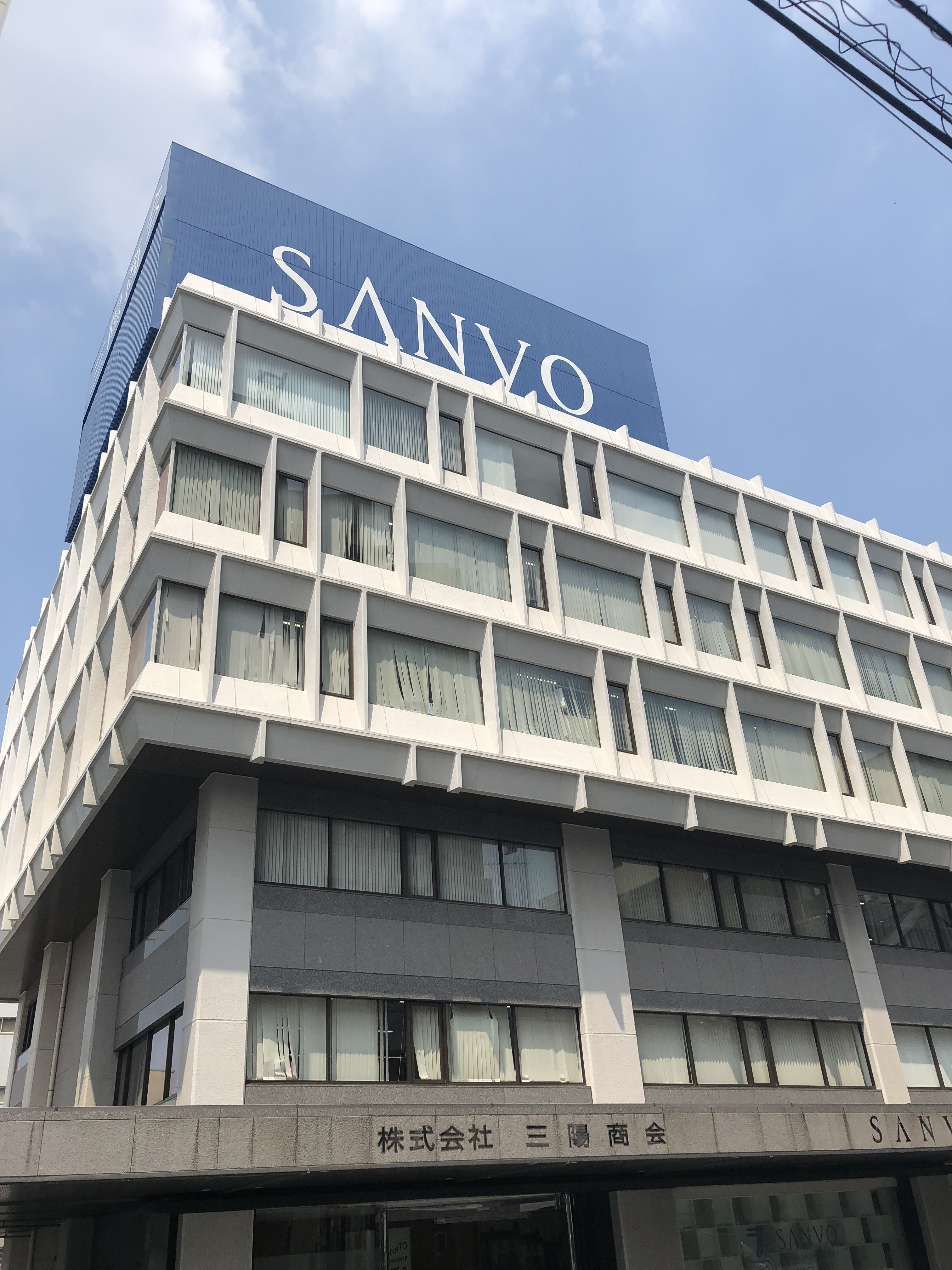 三陽商会の本社です